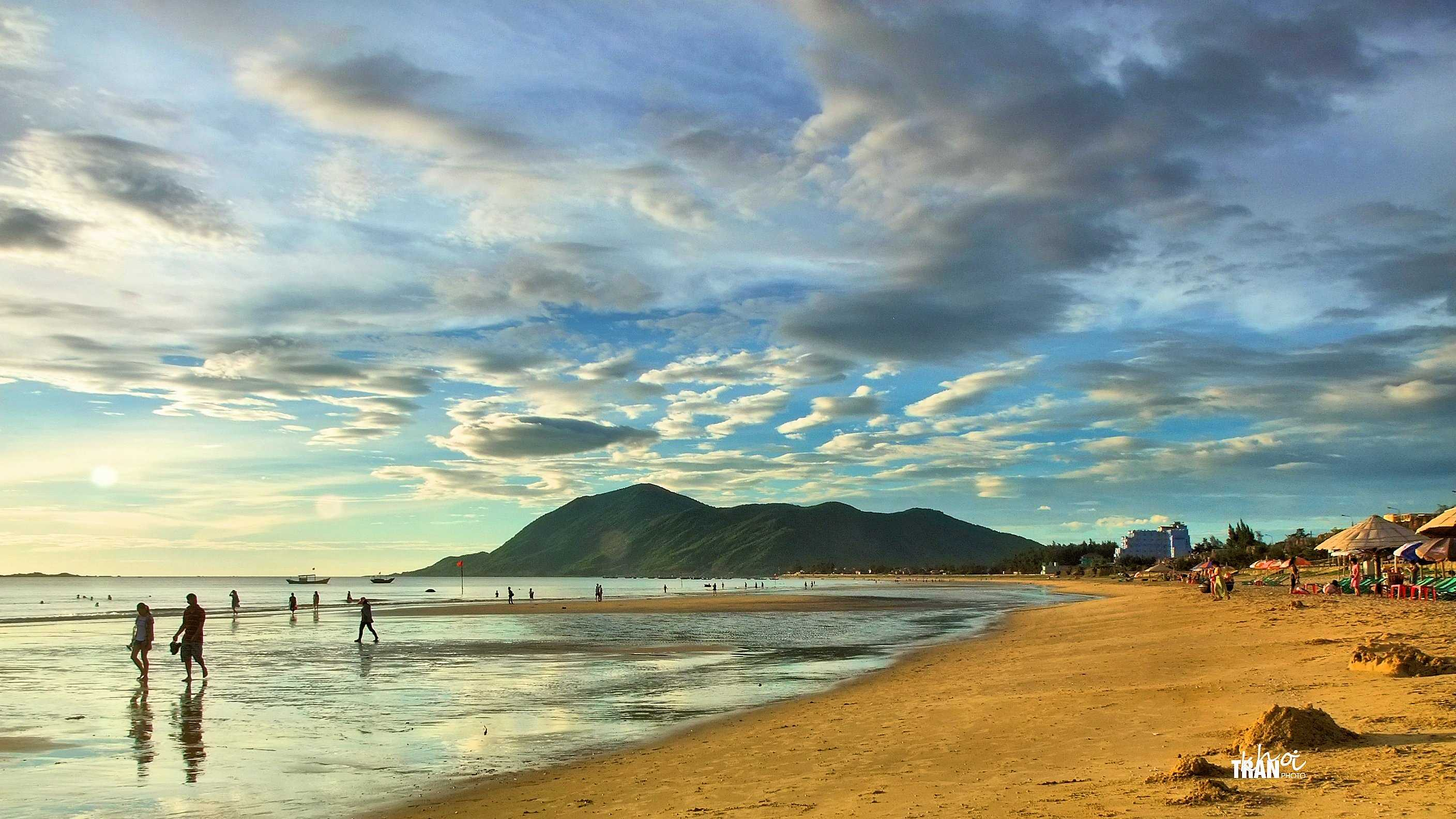 Bãi biển Thiên Cầm trong buổi sớm